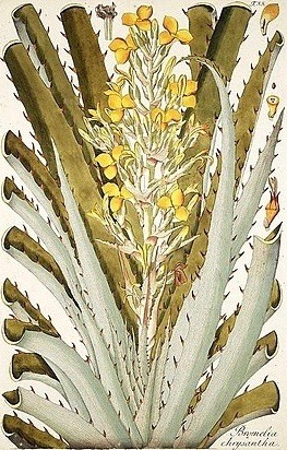 Nikolaus Joseph von Jacquin: Plantarum rariorum horti cæsarei Schœnbrunnensis descriptiones et icones. Band 1, C. F. Wappler, Viennæ 1797, Tafel 55 (Bromelia chrysantha).